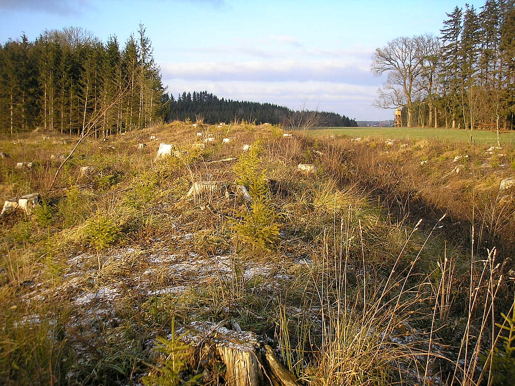 Frühmittelalterlicher Ringwall bei Mittelstetten (Landkreis Fürstenfeldbruck, Oberbayern). Der Abschnittswall der Ostseite nach Norden. Eigene Aufnahme, Dez. 2007 / Early Middle Ages ringwork castle near Mittelstetten (Landkreis Fuerstenfeldbruck, Upper Bavaria, Germany). The eastern fortifications, looking north. Own photo, Dec. 2007